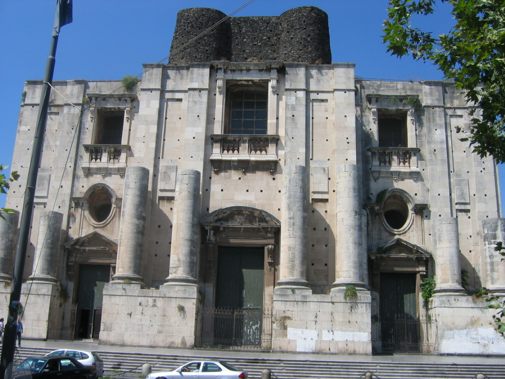 Author : Urban Description: Carmelo Battaglia Santangelo, Facciata incompiuta della chiesa di San Nicolò a Catania (1796), Sicilia Body : Canon Powershot A80 Date : August, 2005